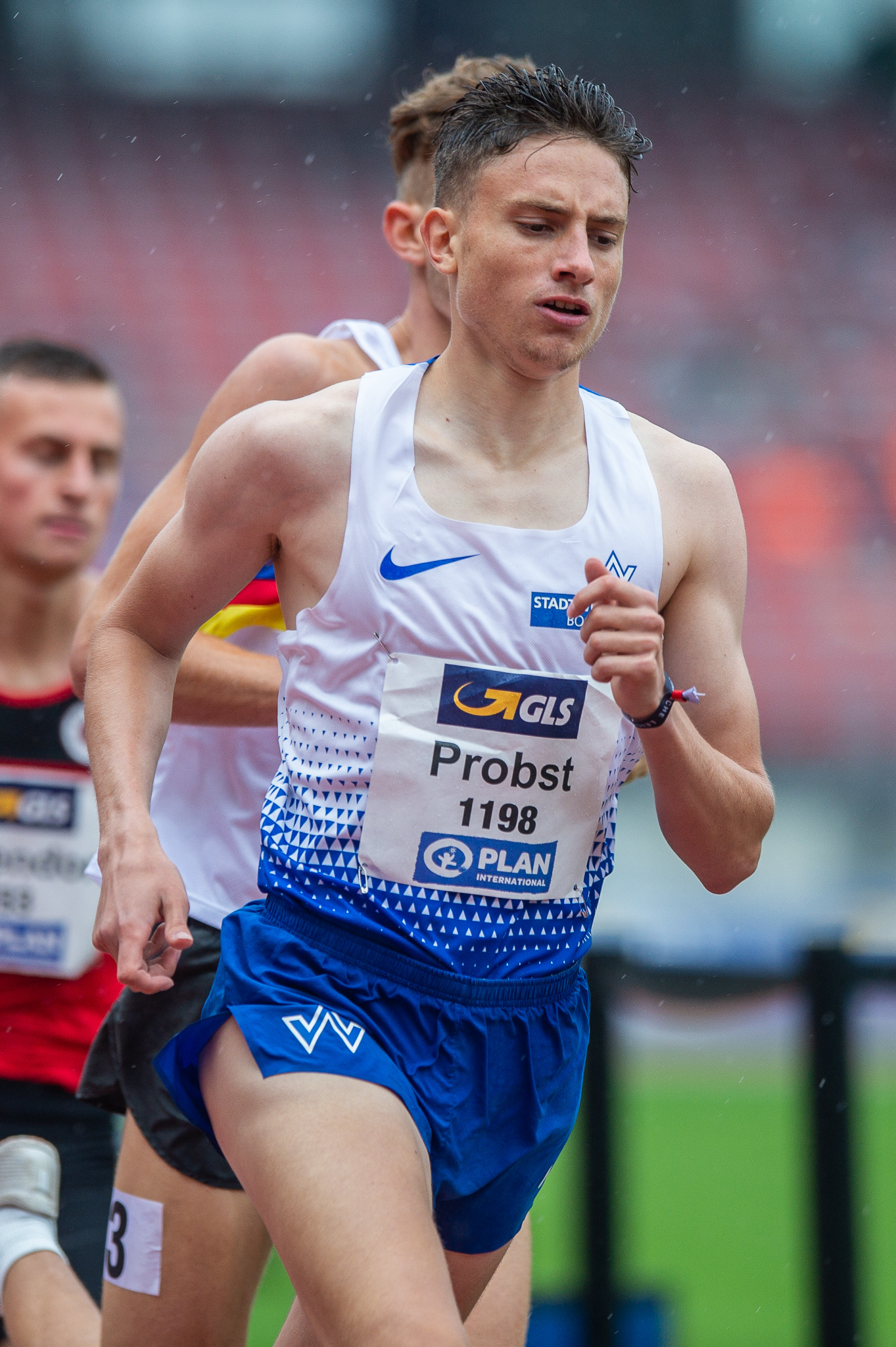 1500-Meter-Lauf,DLV,Deutsche Leichtathletik Meisterschaften 2018,Deutscher Leichtathletik-Verband,Marius Probst,Max-Morlock-Stadion,TV Wattenscheid 01 Leichtathletik e. V.